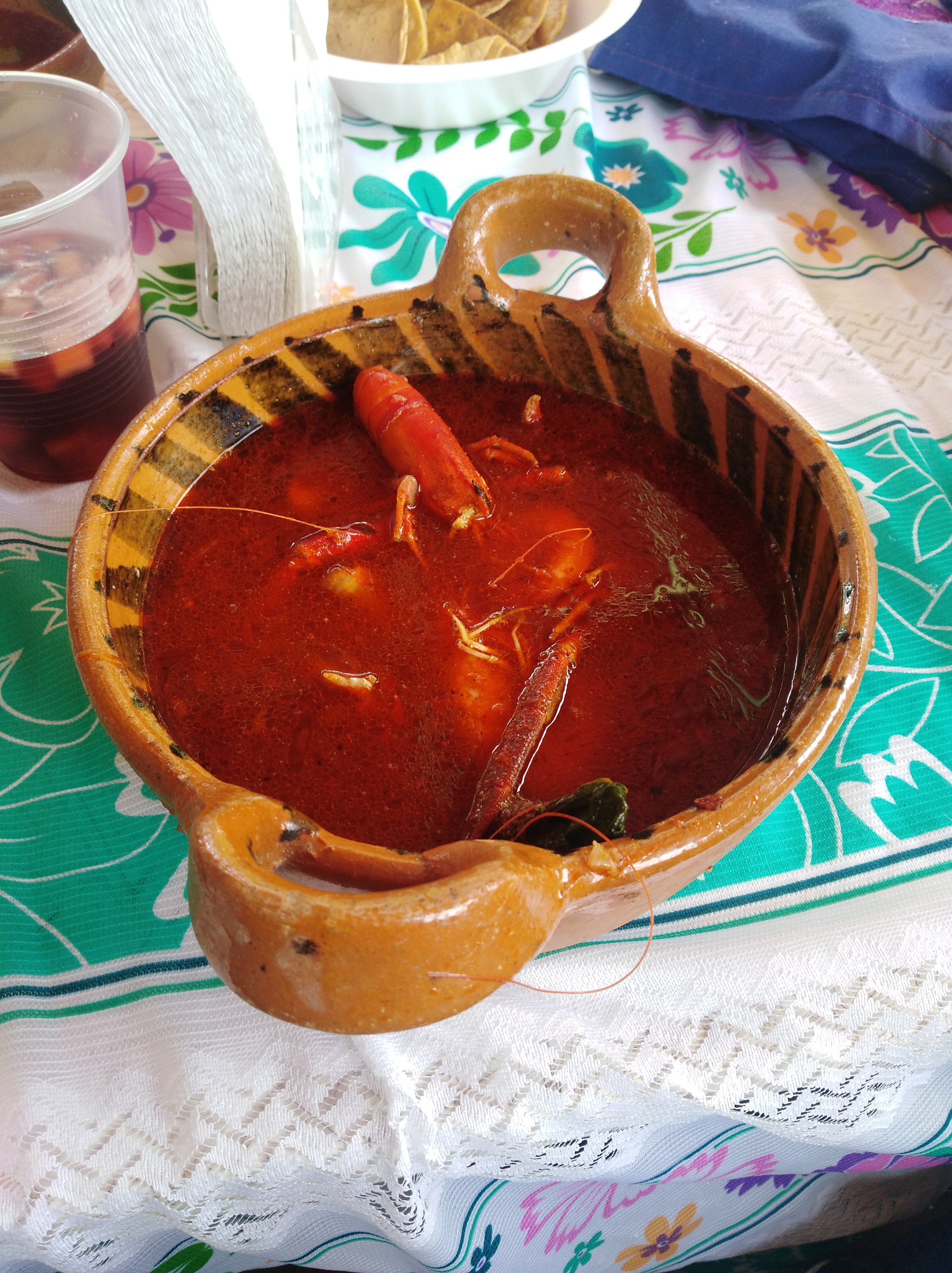 En Nuevo Amelco